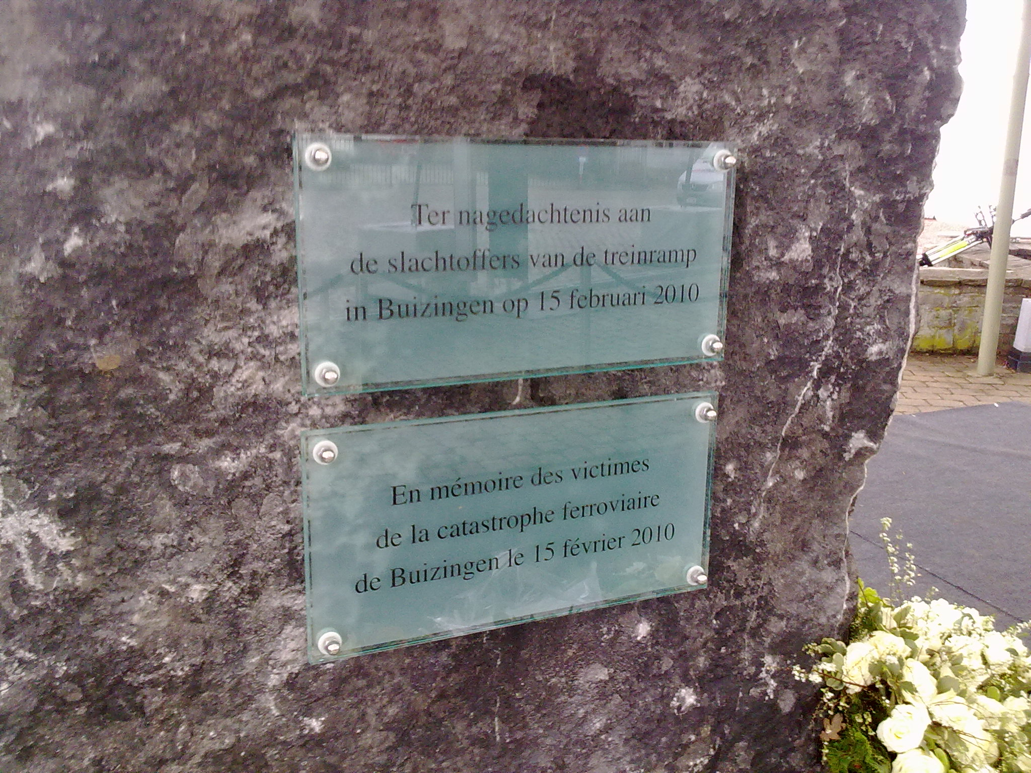 Monument à Halle-Buizingen en Hommage au x 19 victimes décédées dans l'accident de train de Buizingen du 15 fév 2010. Inauguration du 12 Fev 2011